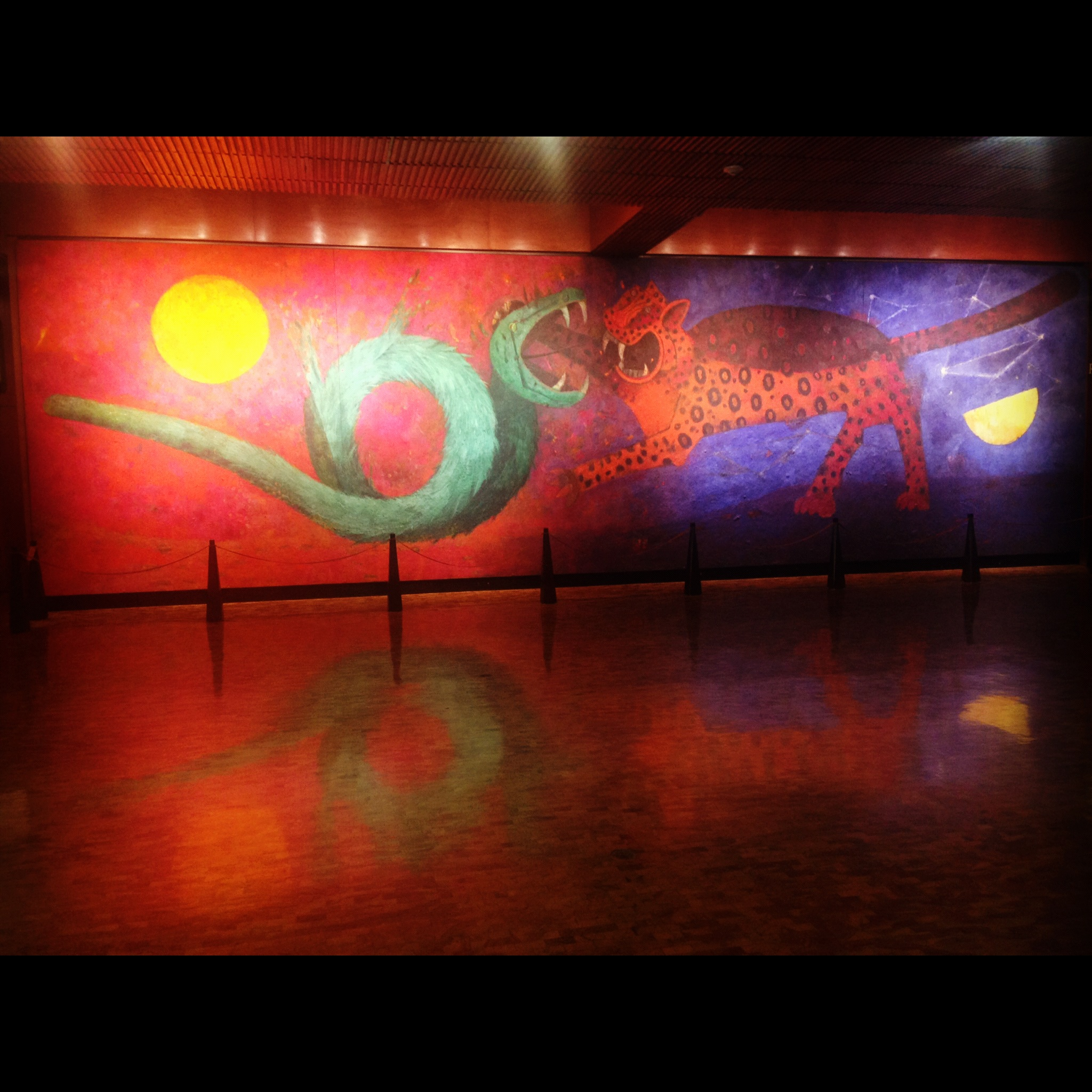 Obra pictórica de tipo mural